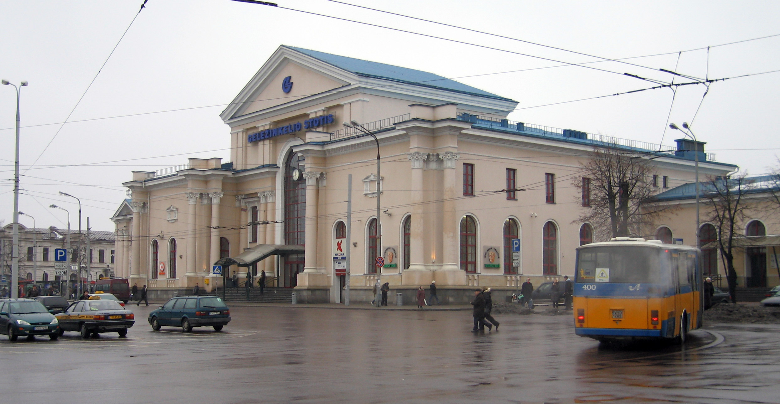 Vilnius train station 2009